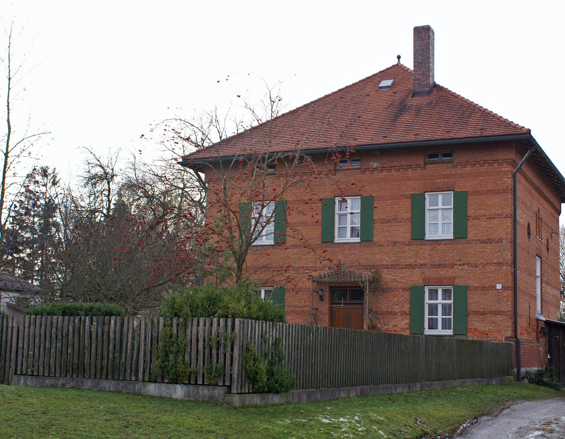 Pfarrhof in Dillishausen, Lamerdingen